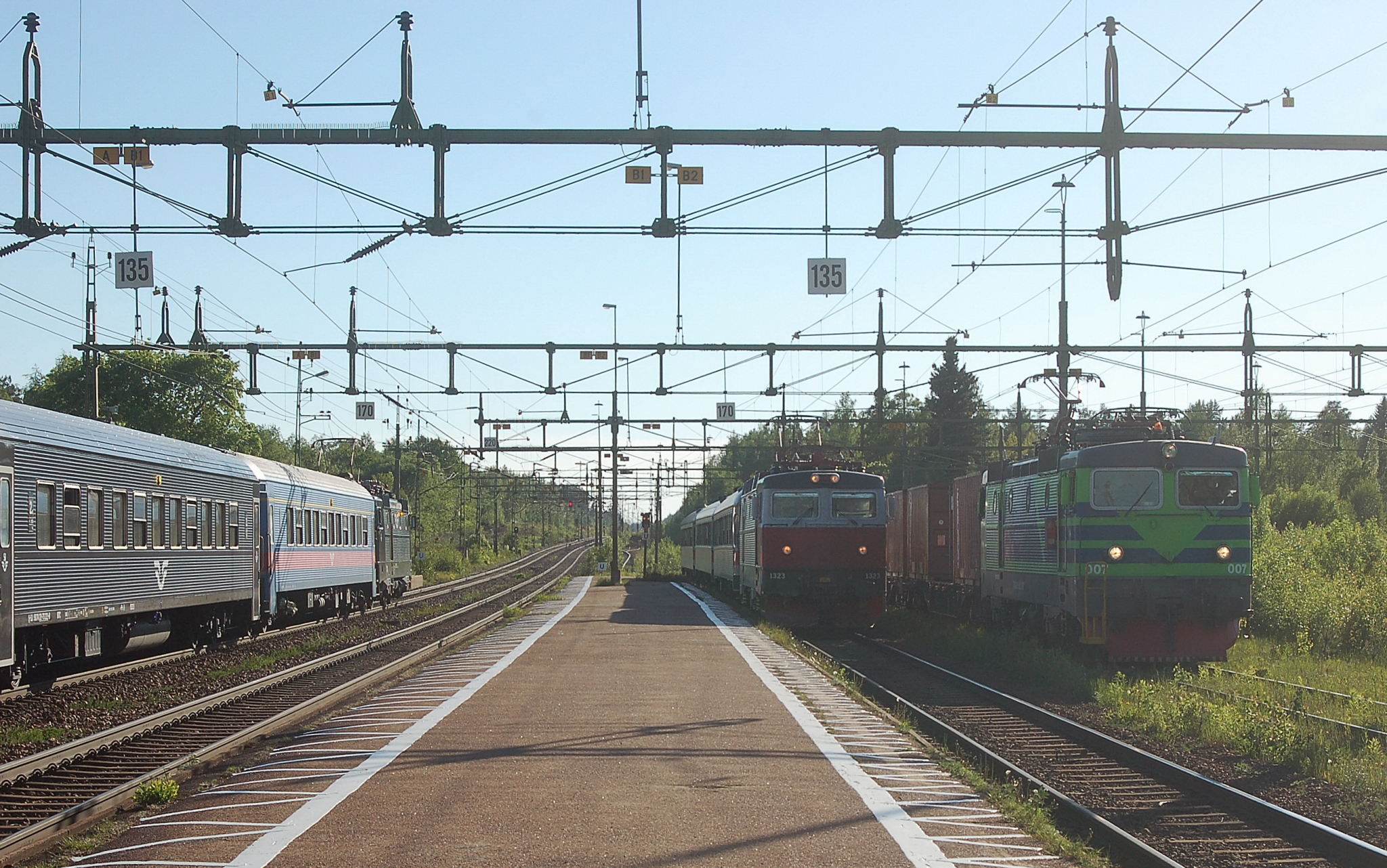 Två av Tågabs tåg samt ett SJ tåg på järnvägstationen i Laxå, Sweden.